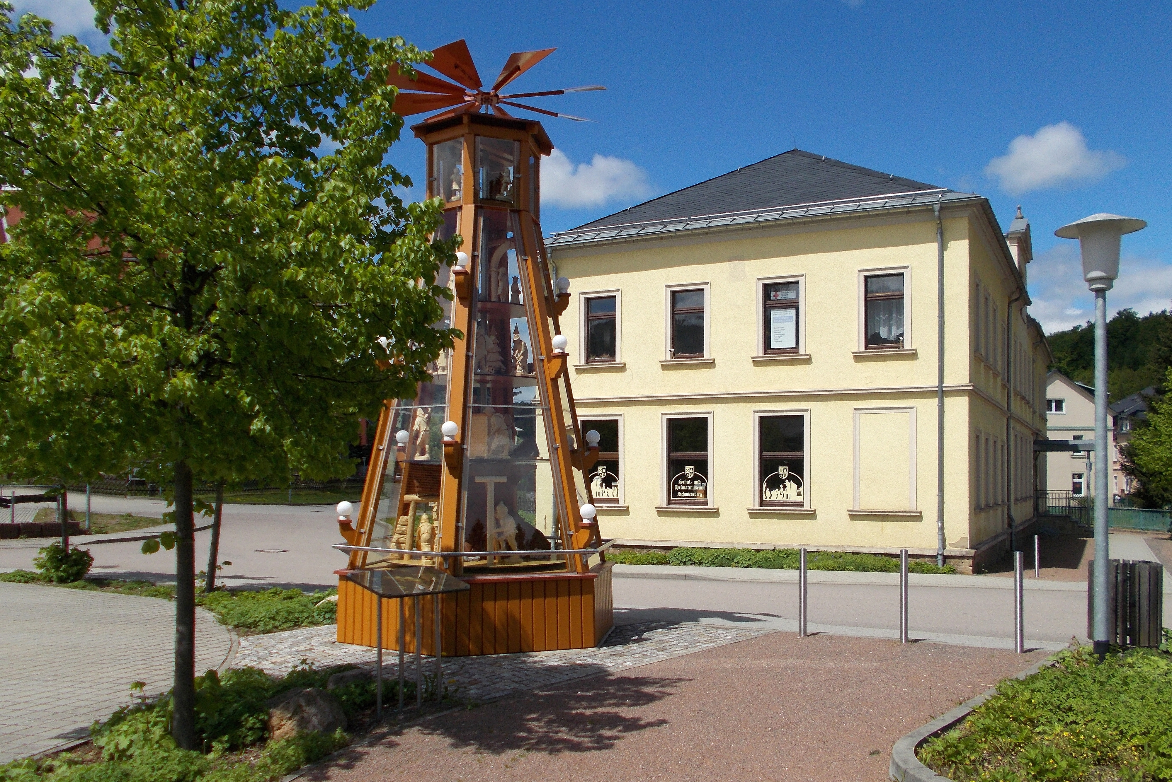 Ehemalige Grundschule in Schmiedeberg - bei der Flut 2002 stark beschädigt und als Bürgerhaus mit Schulmuseum, Bücherei und Vereinsräumen umgebaut.